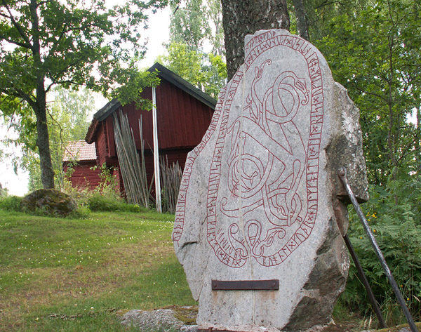 Foto: Gustaf Eriksson Datum: 14 juli 2005 Beskrivning: Odendisastenen i Fläckebo 14 juli 2005 kl.18.13 Zoeds 600x473 (174570 bytes) (* Foto: Gustaf Eriksson * Datum: 14 juli 2005 * Beskrivning: Odendisastenen i Fläckebo PD-user| Gustaf Eriksson ) 14 juli 2005 kl.18.10 Zoeds 600x473 (174570 bytes) (Odendisastenen i Fläckebo)